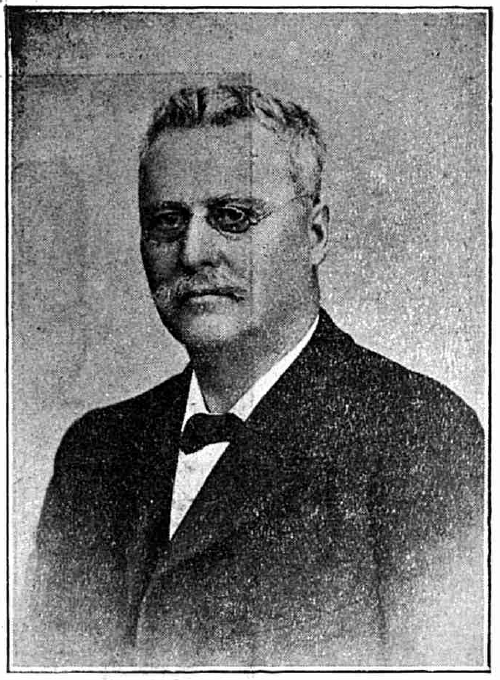 Dumitru Marinescu Bragadiru - industriaş, România, 1910